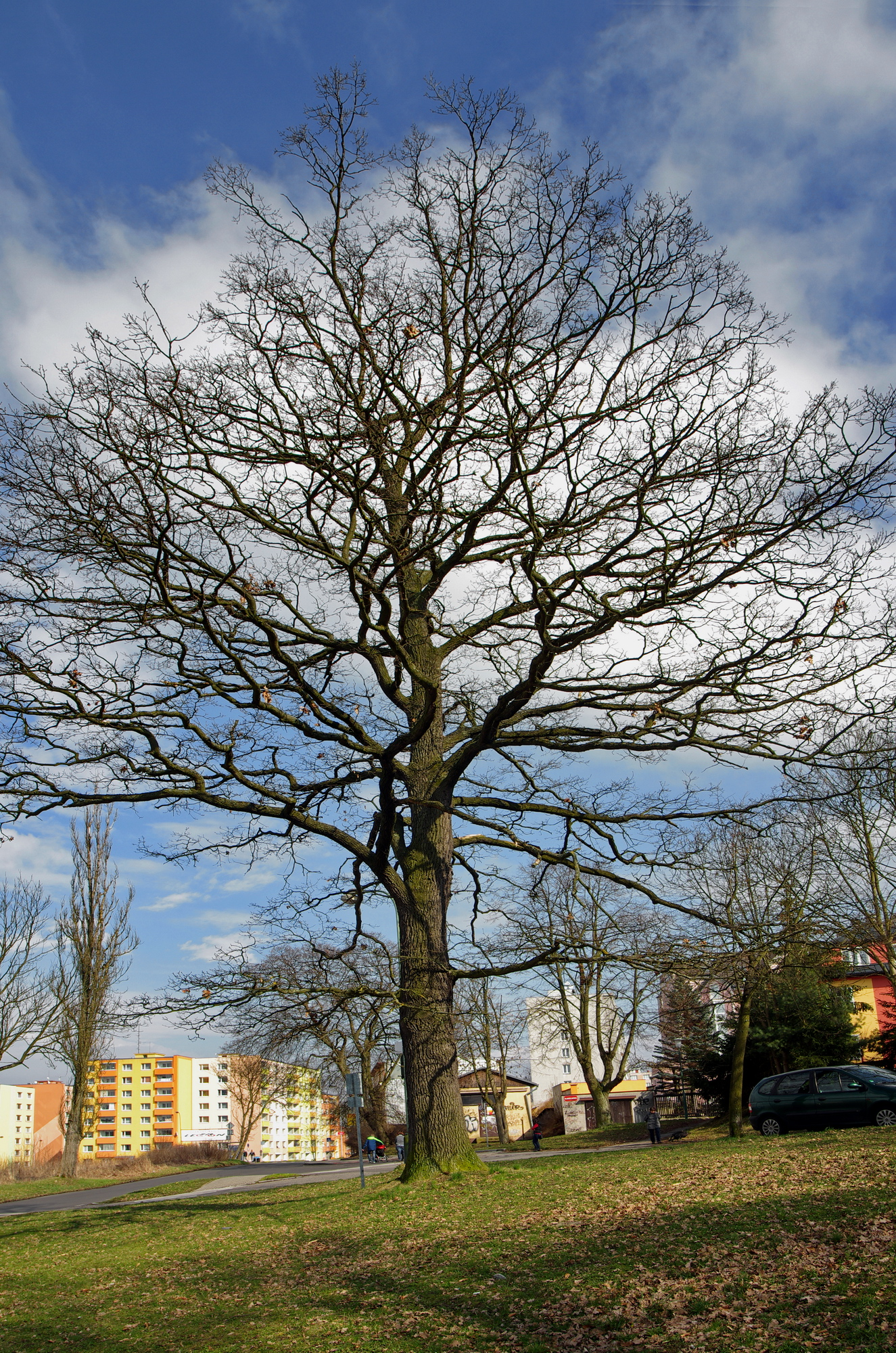 Památný strom - Dub Jana Ámose Komenského - Karlovy Vary, místní část Drahovice